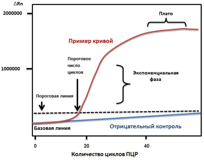 График амплификации в количественном ПЦР в реальном времени